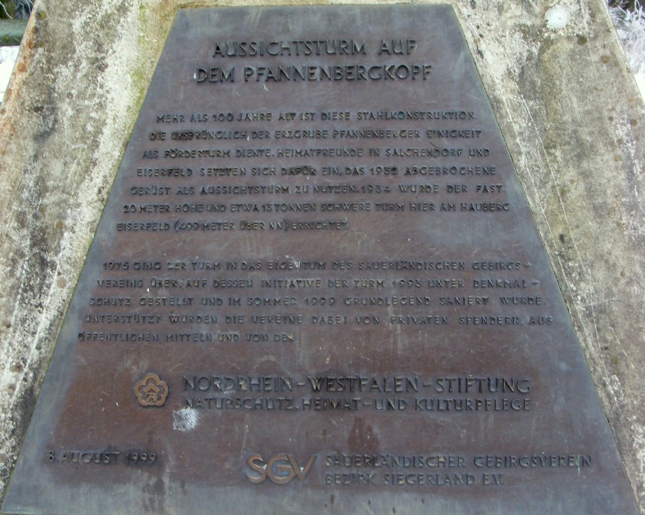 Tafel am Pfannenbergturm. Inschrift der Tafel (Gemischtschreibung und Interpunktion selbst abgeändert): Aussichtsturm auf dem Pfannenbergkopf Mehr als 100 Jahre alt ist diese Stahlkonstruktion, die ursprünglich der Erzgrube Pfannenberger Einigkeit als Förderturm diente. Heimatfreunde in Salchendorf und Eiserfeld setzten sich dafür ein, das 1932 abgebrochene Gerüst als Aussichtsturm zu nutzen. 1934 wurde der fast 20 Meter hohe und etwa 13 Tonnen schwere Turm hier am Hauberg Eiserfeld (499 Meter über NN) errichtet. 1976 ging der Turm in das Eigentum des Sauerländischen Gebirgsvereins über, auf dessen Initiative der Turm 1995 unter Denkmalschutz gestellt und im Sommer 1999 grundsaniert wurde. Unterstützt wurden die Vereine dabei von privaten Spendern, aus Öffentlichen Mitteln und von der Nordrhein-Westfalen-Stiftung – Naturschutz, Heimat- und Kulturpflege. August 1999 SGV – Sauerländer Gebirgsverein, Bezirk Siegerland e.V.